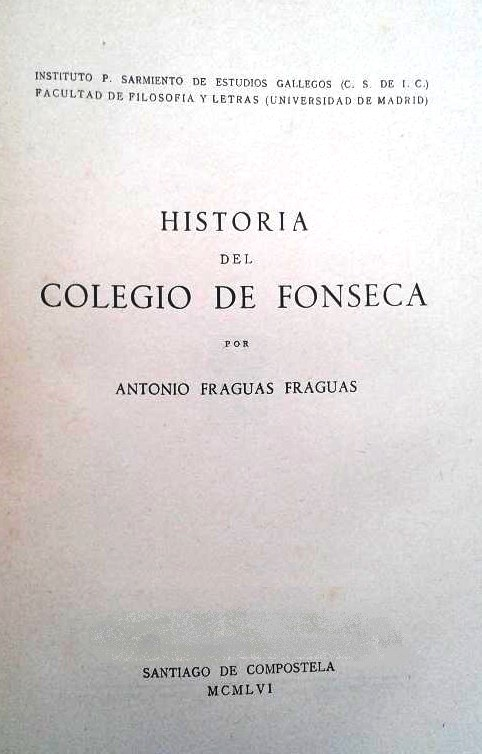 Historia del Colegio de Fonseca